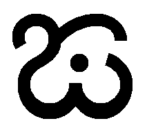 нгакараву